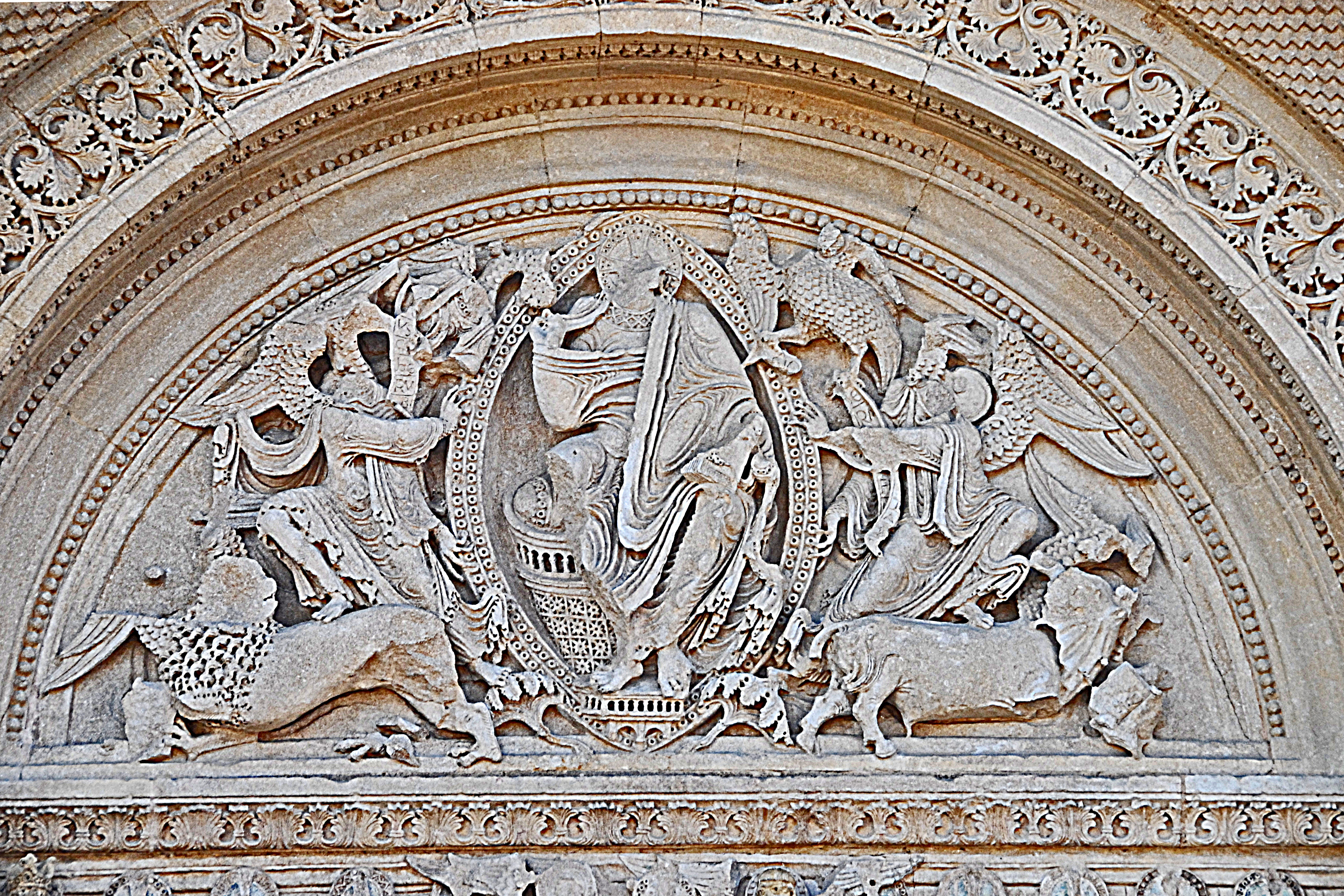 Großes Nordportal, Tympanon